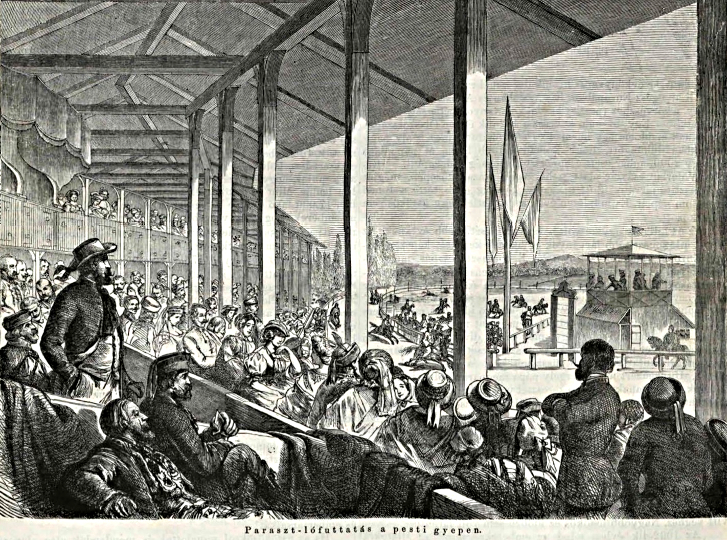 Vízkelety Bála: Paraszt-lófuttatás a pesti gyepen. Vasárnapi Ujság 1861. 8. évf. 32. sz.